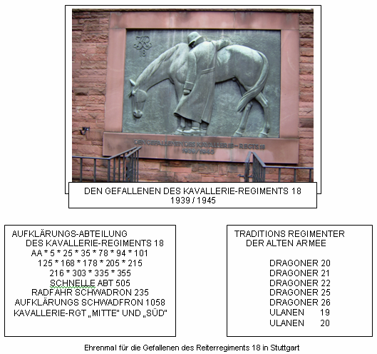 Denkmal für des Reiter-Regiment 19 der Wehrmacht an der ehemaligen Reiterkaserne in Stuttgart – Bad Cannstatt